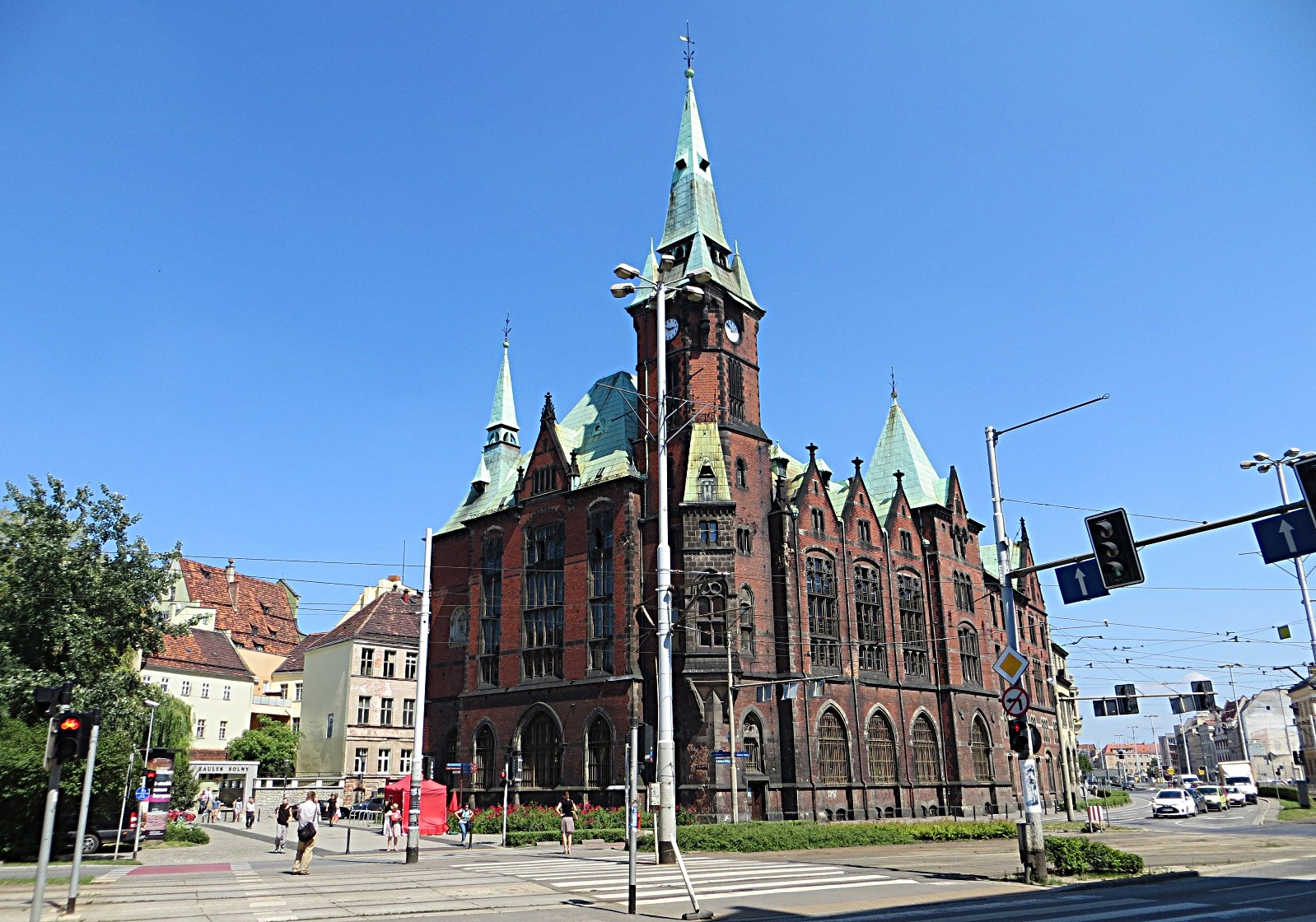 Biblioteka Uniwersytecka